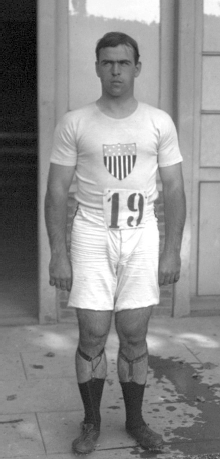 [Wilbur] Burroughs [lanceur de poids américain, 2 août 1908, meeting international d'athlétisme, à Colombes] : [photographie de presse] / [Agence Rol]